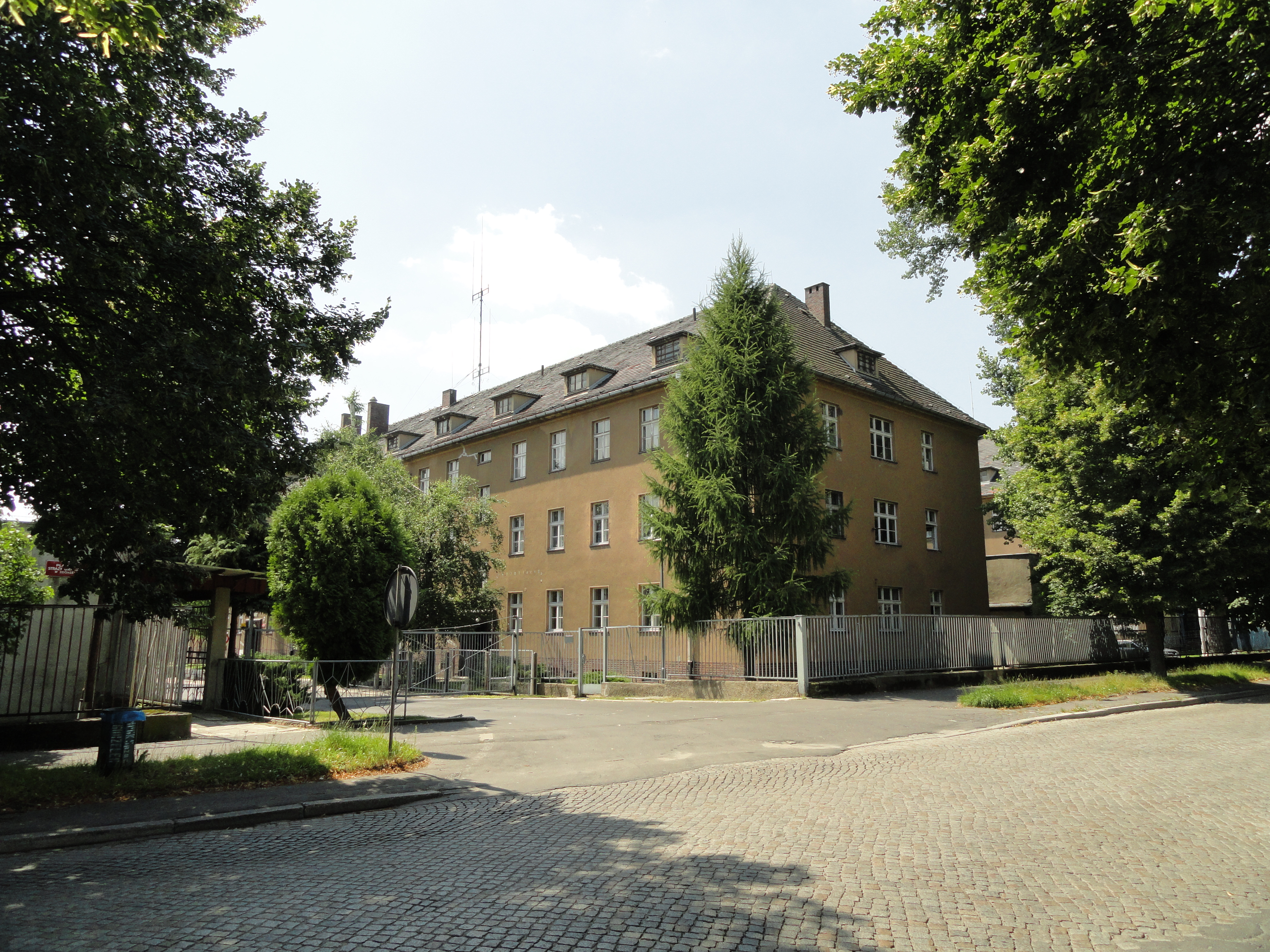 Gebäude der ehemaligen Kleist-Kaserne in Zgorzelec